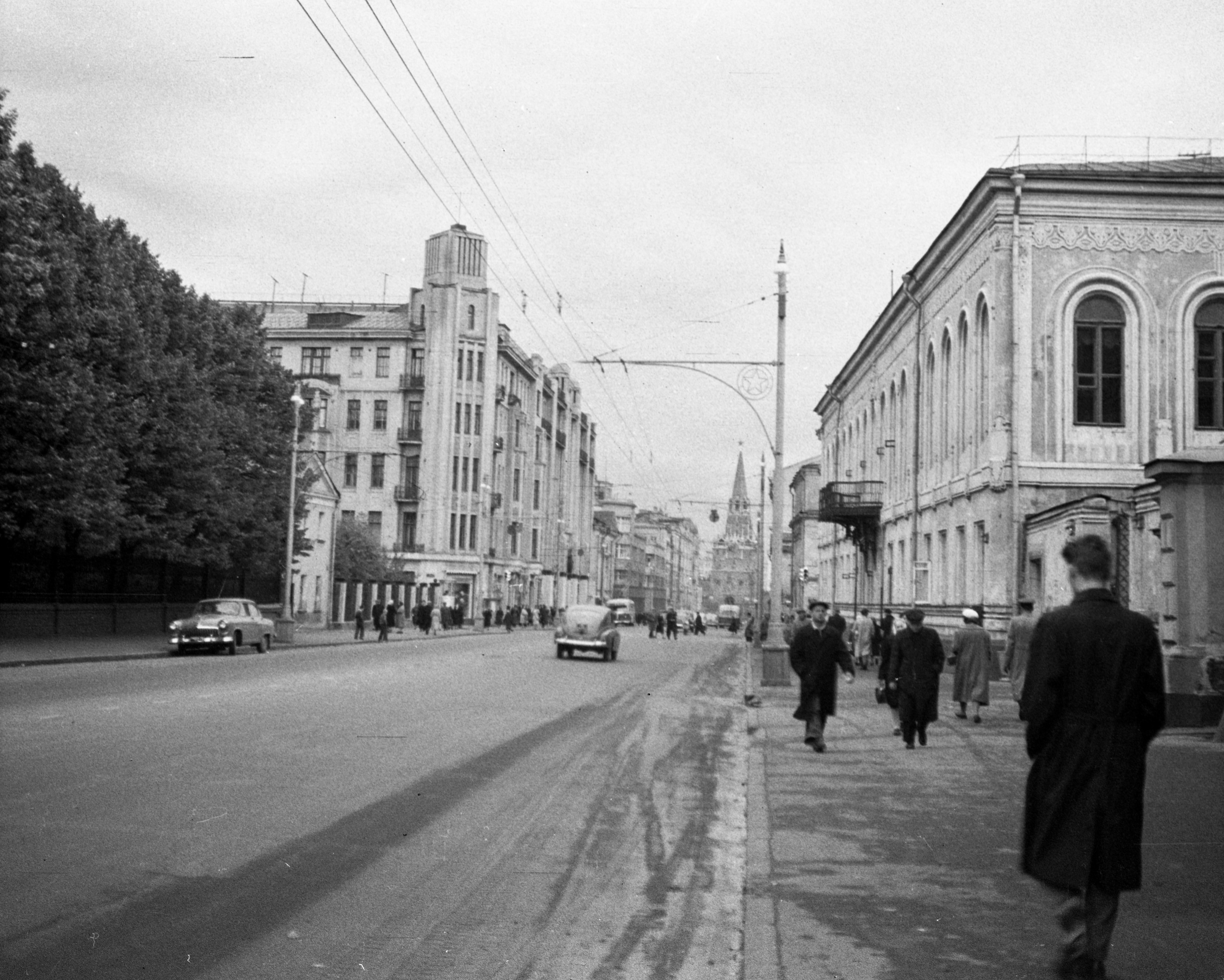 Vozdvizsenyka utca a Kreml felé nézve, balra a Voentorg áruház. Location: Russia, Moscow Tags: Soviet Union, street view Title: Vozdvizsenyka utca a Kreml felé nézve, balra a Voentorg áruház.